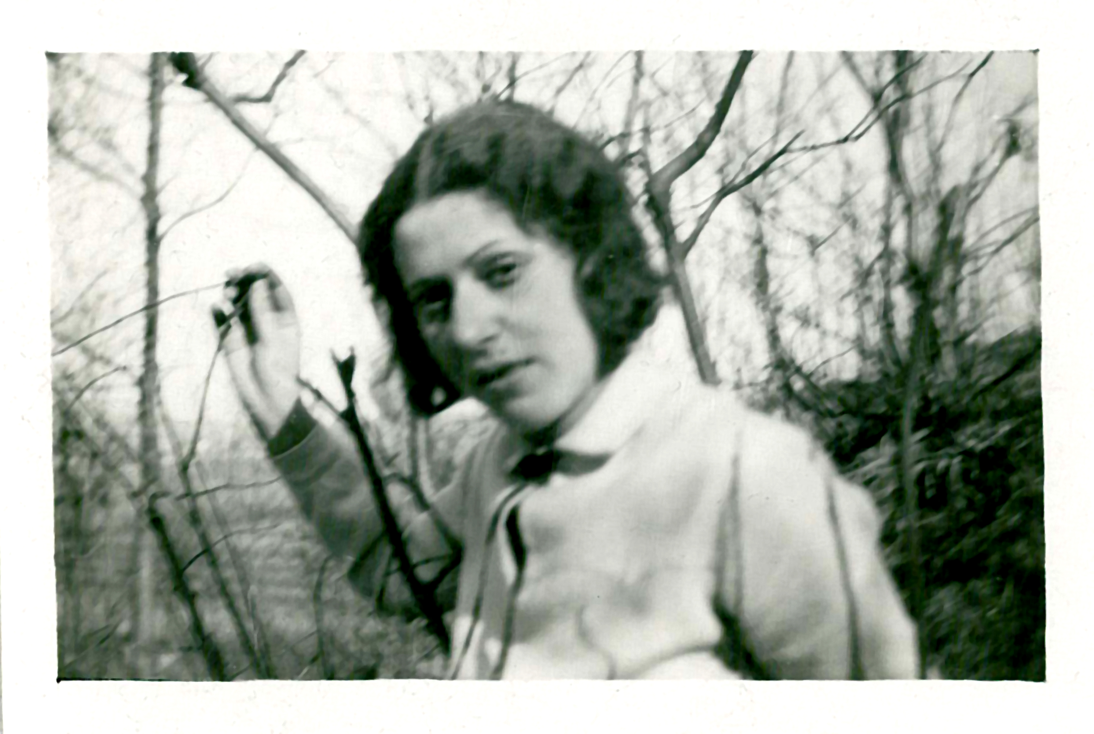 Fotografia rappresentante Maria Marchesini